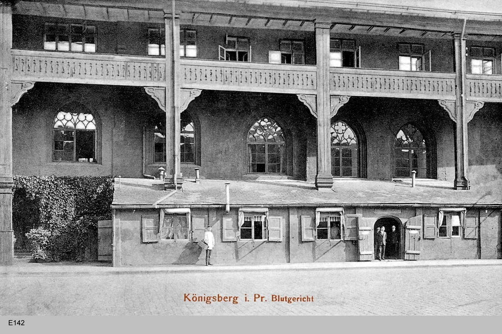 Blutgericht im Schlosshof des Königsberges Schlosses